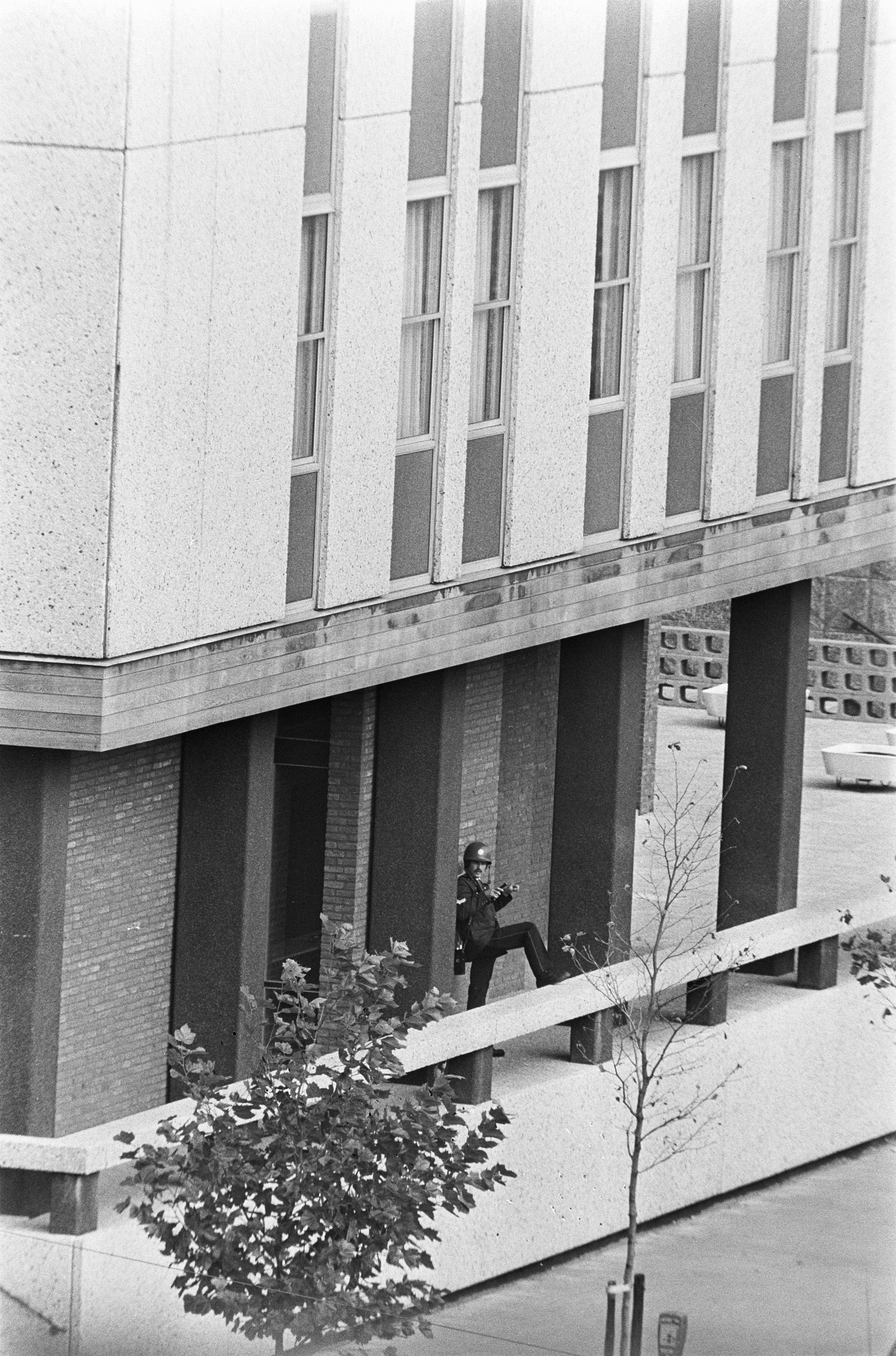 Collectie / Archief : Fotocollectie Anefo Reportage / Serie : [ onbekend ] Beschrijving : Japanse terroristen gijzelen Franse ambassadeur en 10 anderen in Franse ambassade in Den Haag , een gehelmde politieman bij de ingang van de ambassade / Datum : 15 september 1974 Locatie : Den Haag, Zuid-Holland Trefwoorden : ambassades, ambassadeurs, gijzelingen, ingangen, terroristen Fotograaf : Mieremet, Rob / Anefo Auteursrechthebbende : Nationaal Archief Materiaalsoort : Negatief (zwart/wit) Nummer archiefinventaris : bekijk toegang 2.24.01.05 Bestanddeelnummer : 927-4511